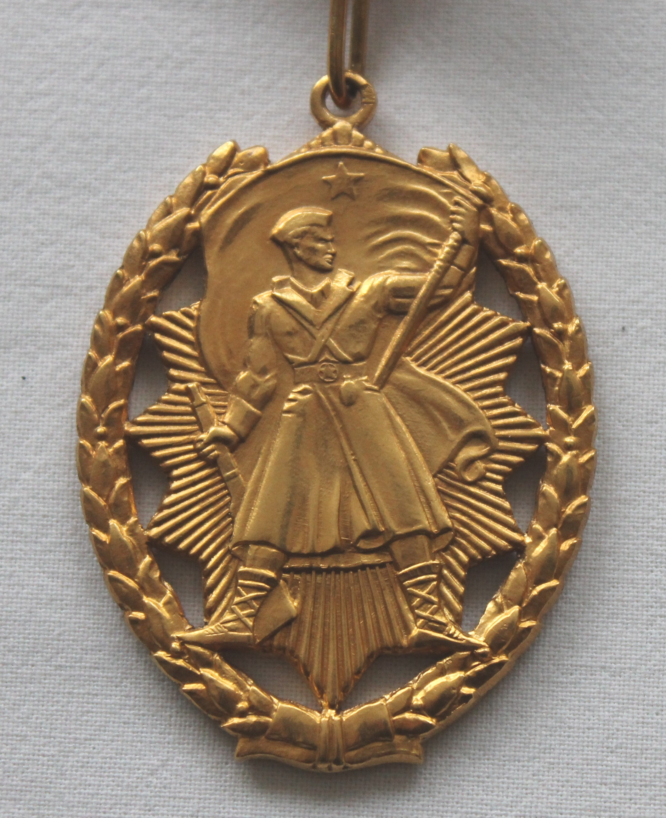 Орден народног хероја Југославије